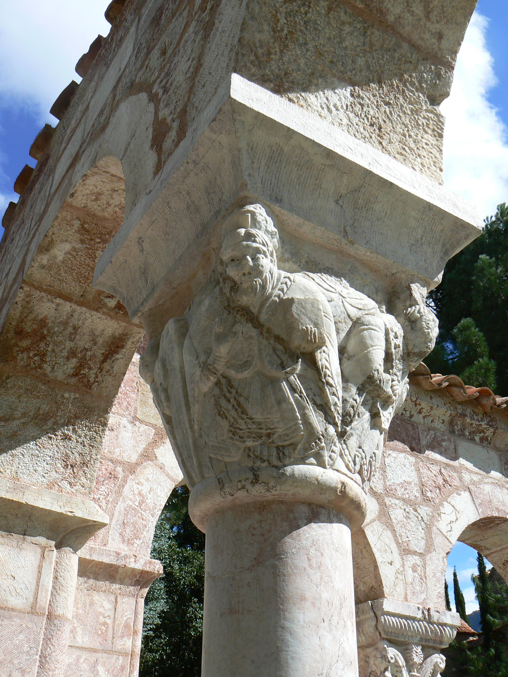 Abbaye Saint-Michel de Cuxa